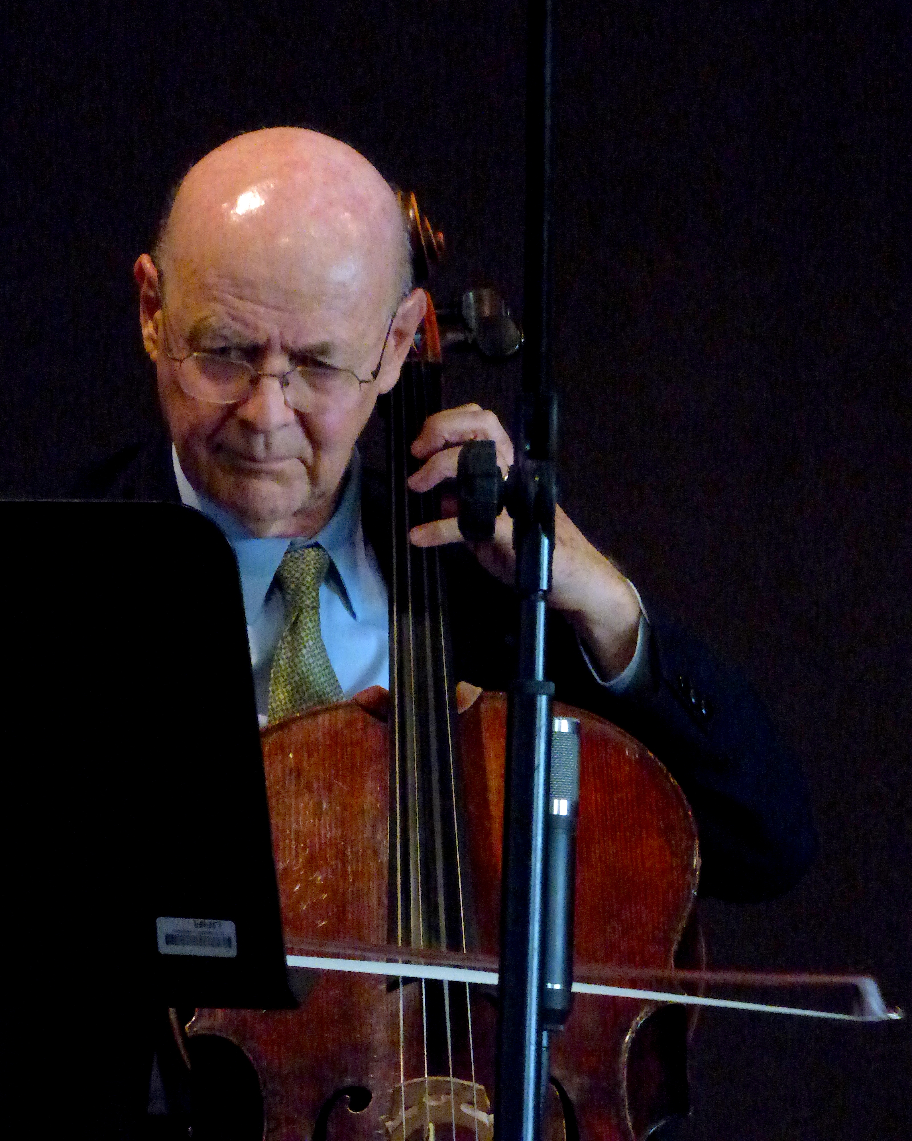 Carlos Prieto interpretando la Suite No. 3 para cello solo, de Johann Sebastian Bach.